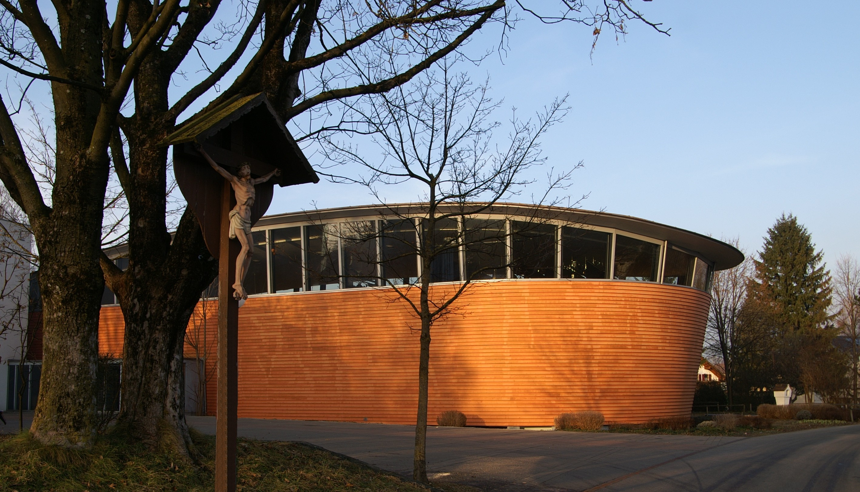 J.J.Ender-Saal in Mäder erbaut 1994 von Baumschlager Eberle in Vorarlberg